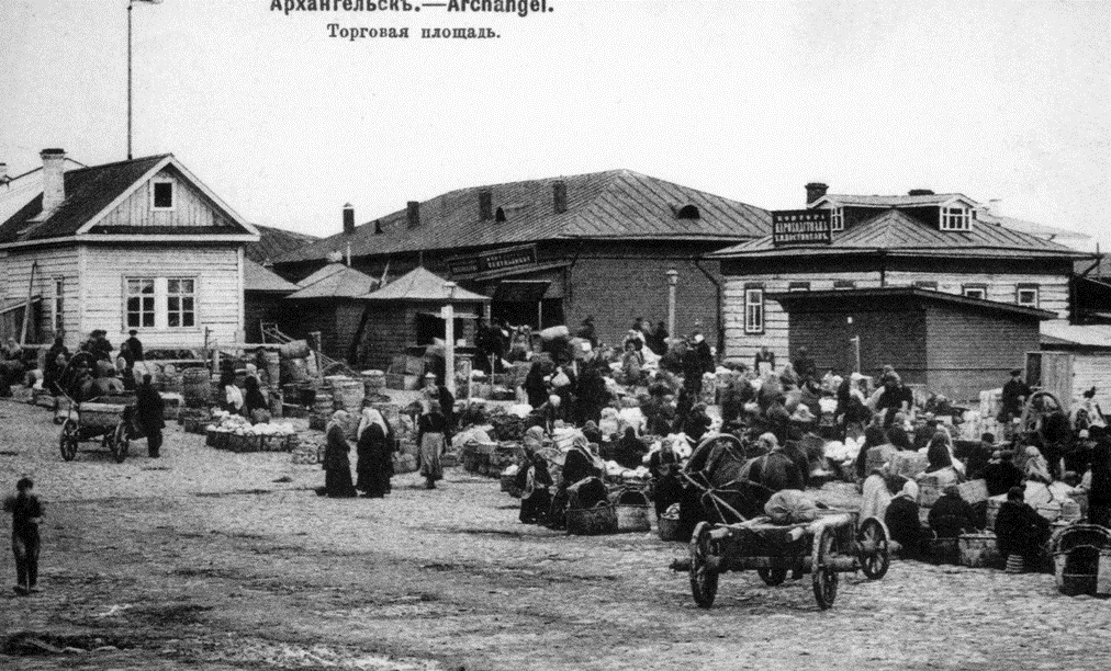 Архангельск - Торговая площадь, начало XX века